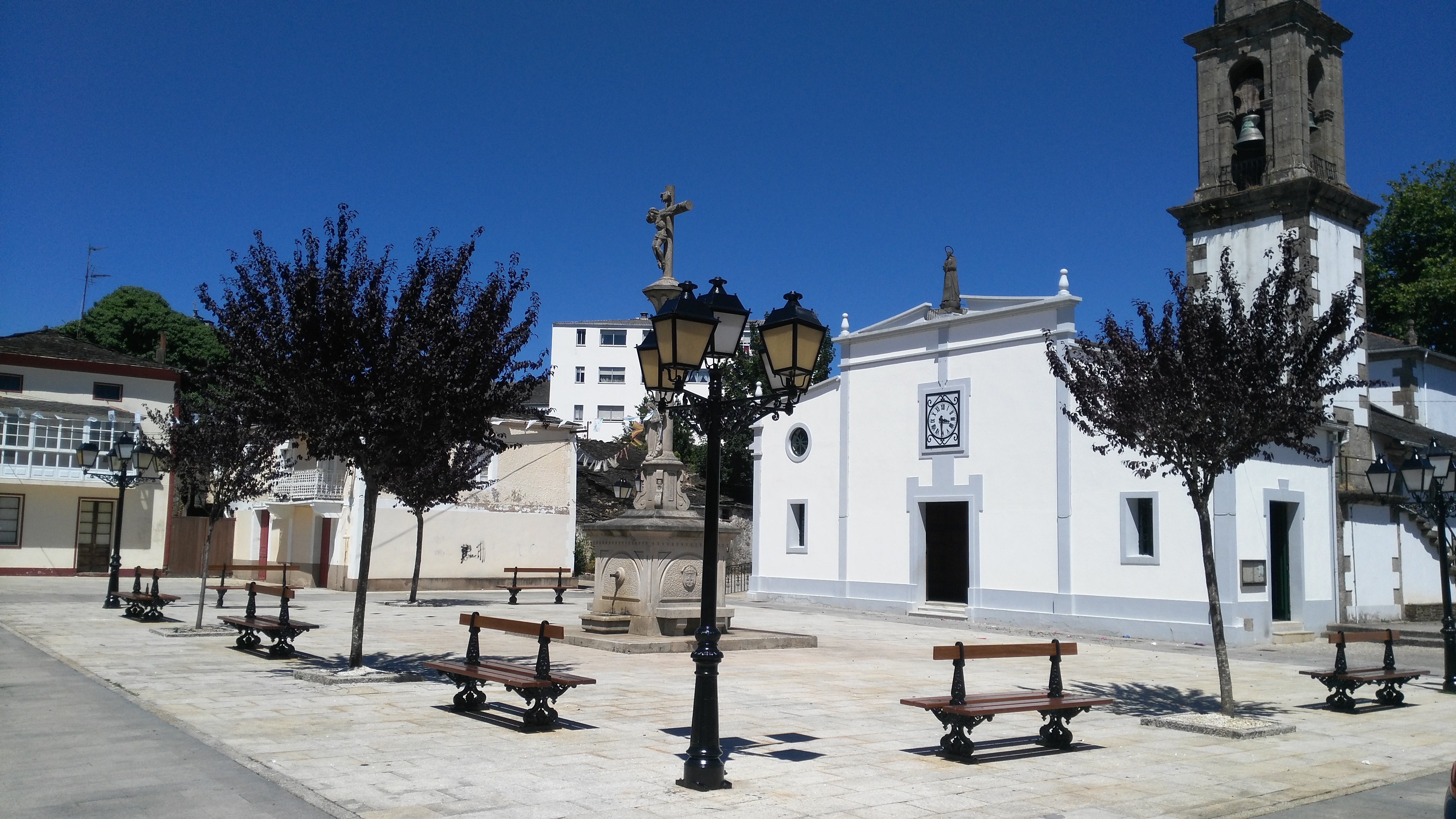 Praza da Igrexa de Santa Maria en As Pontes